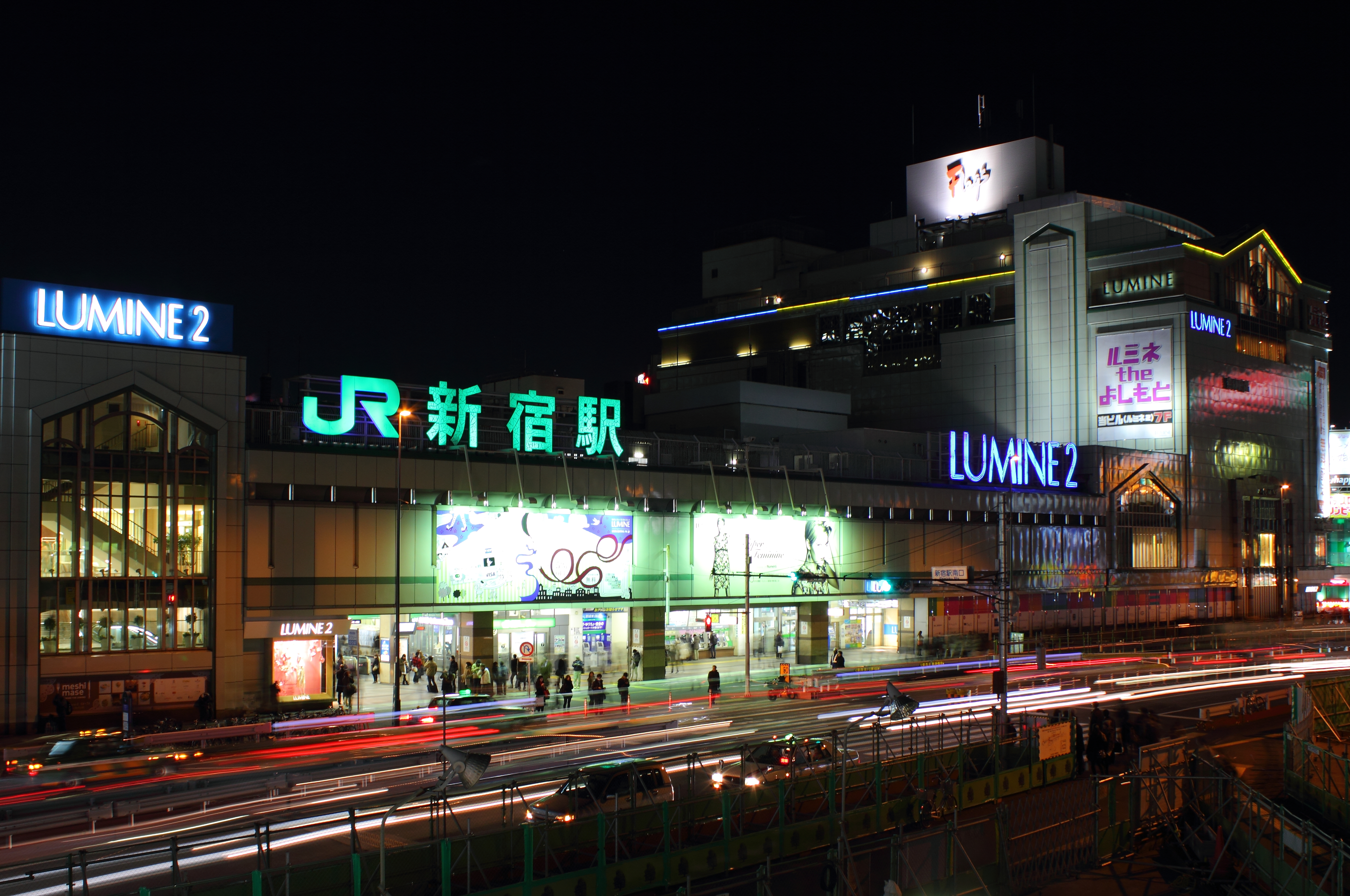 新宿駅南口